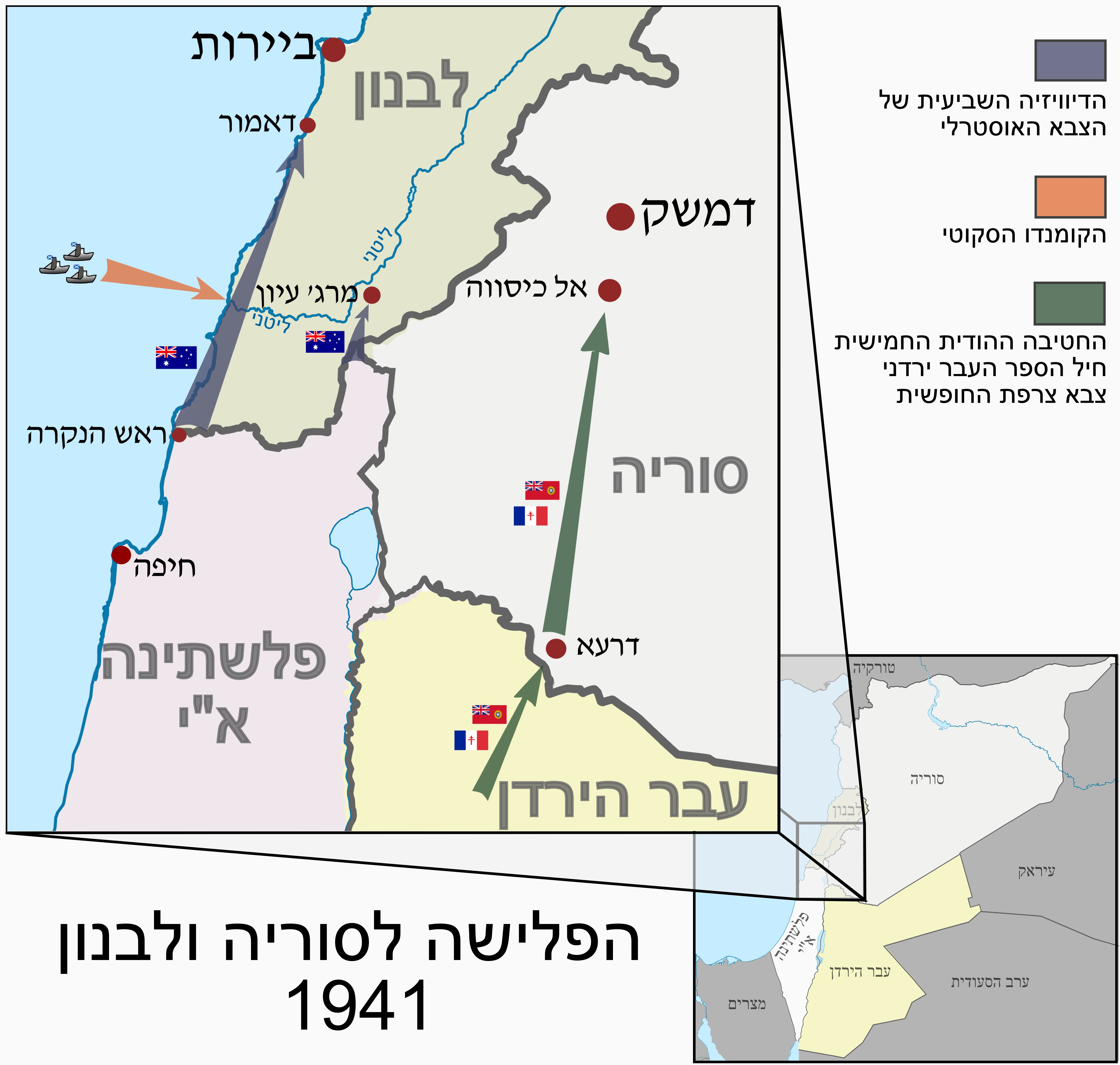 הפלישה לסוריה ולבנון 1941.svg